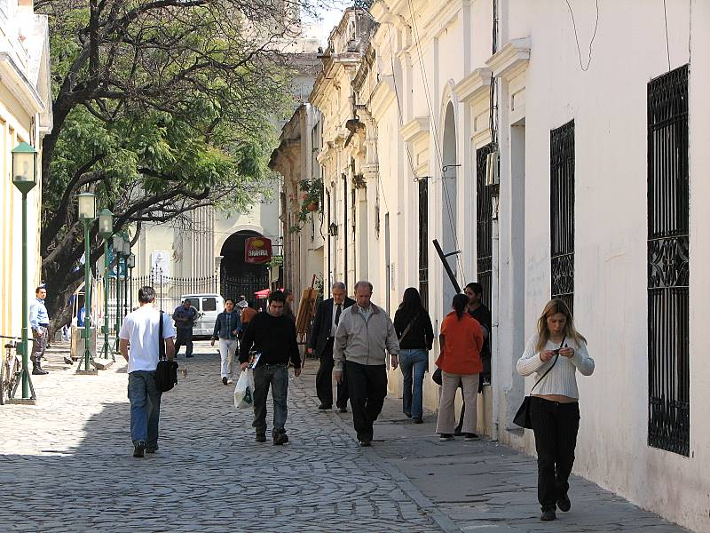 Otra peatonal, que sale desde uno de los costados de la Plaza San martín, en el centro de Córdoba.